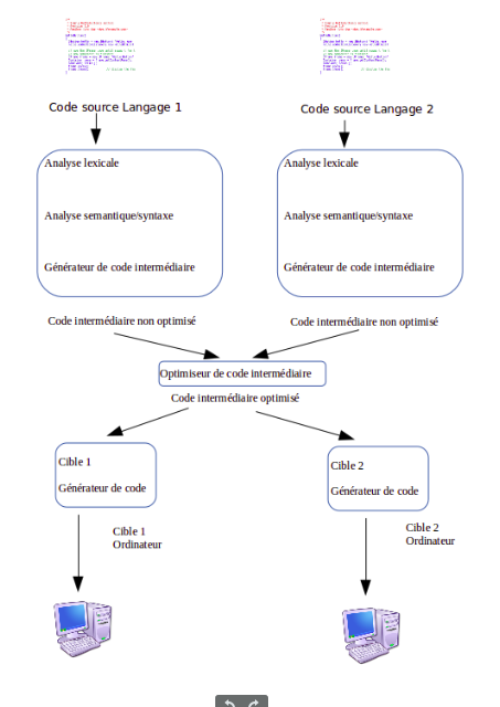 Une compilatition multiple